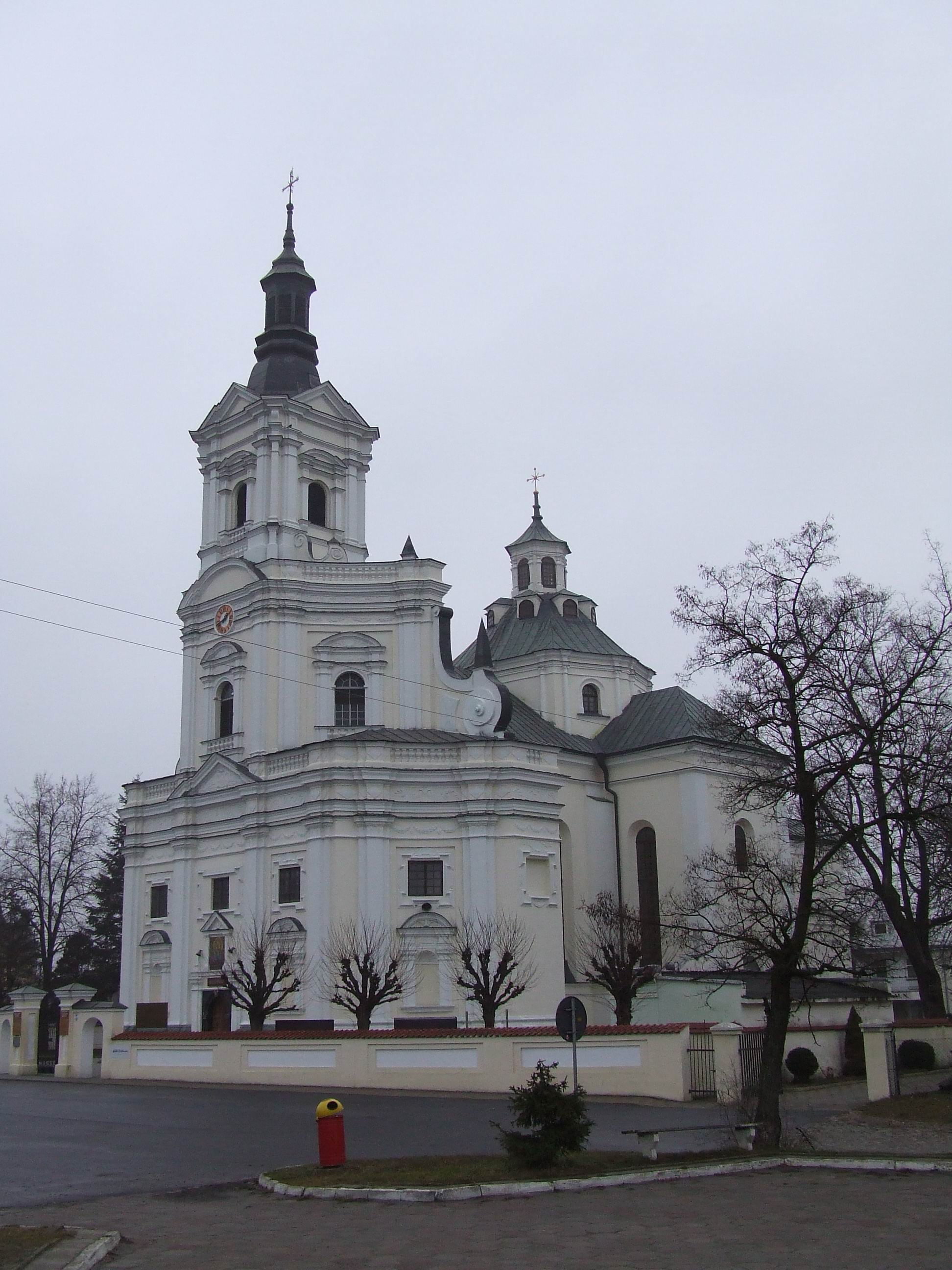 Kodeń, kościół pw. św. Anny z lat 1620-36, sanktuarium Matki Boskiej Kodeńskiej